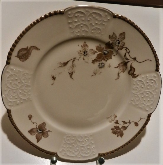 Teller des Service mit typischer Sorauer Goldbemalung